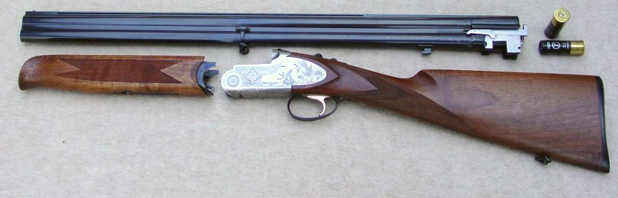 BDF zerlegt in Hauptteile: Laufbündel, Vorderschaft, Schaft